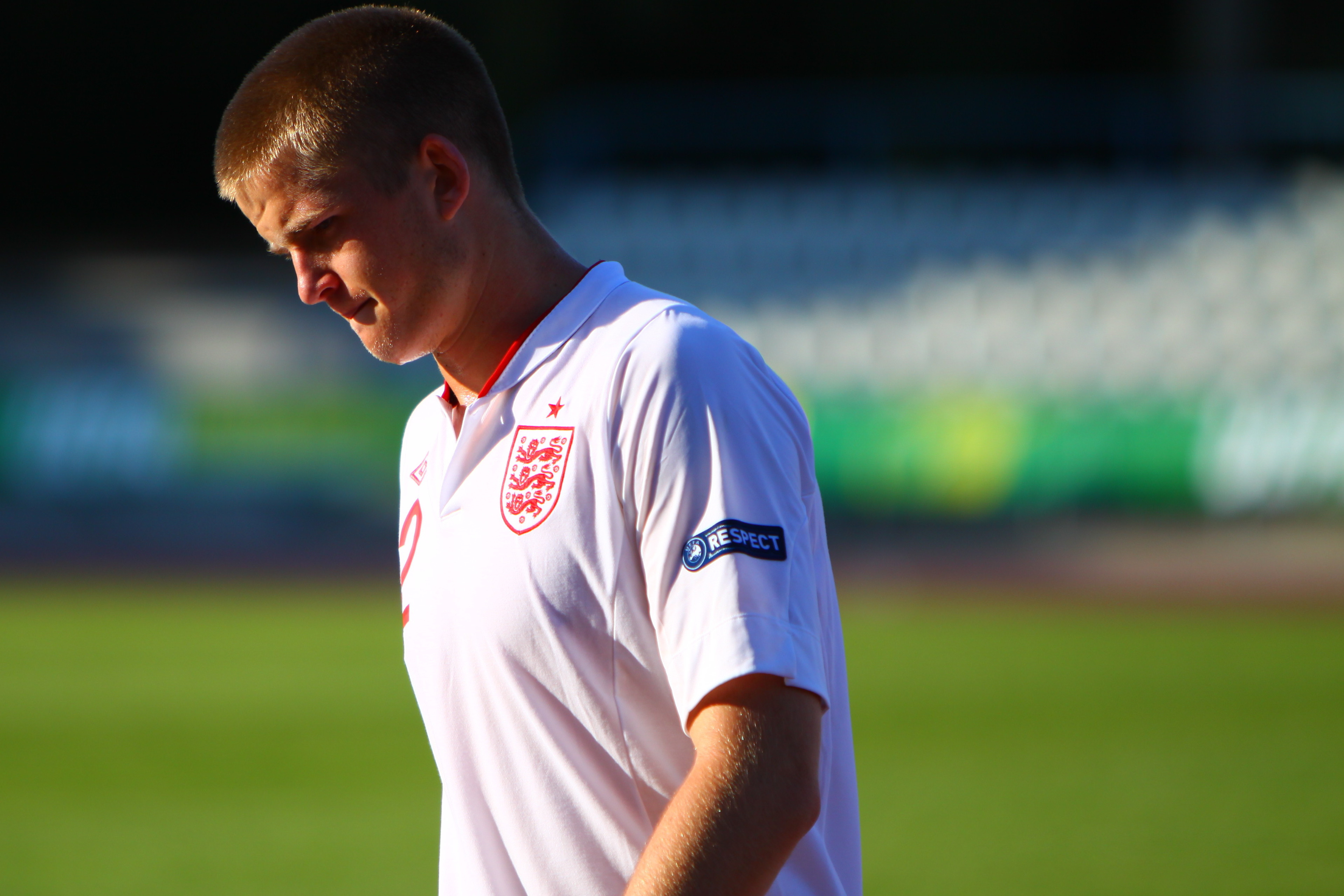 Eric Dier